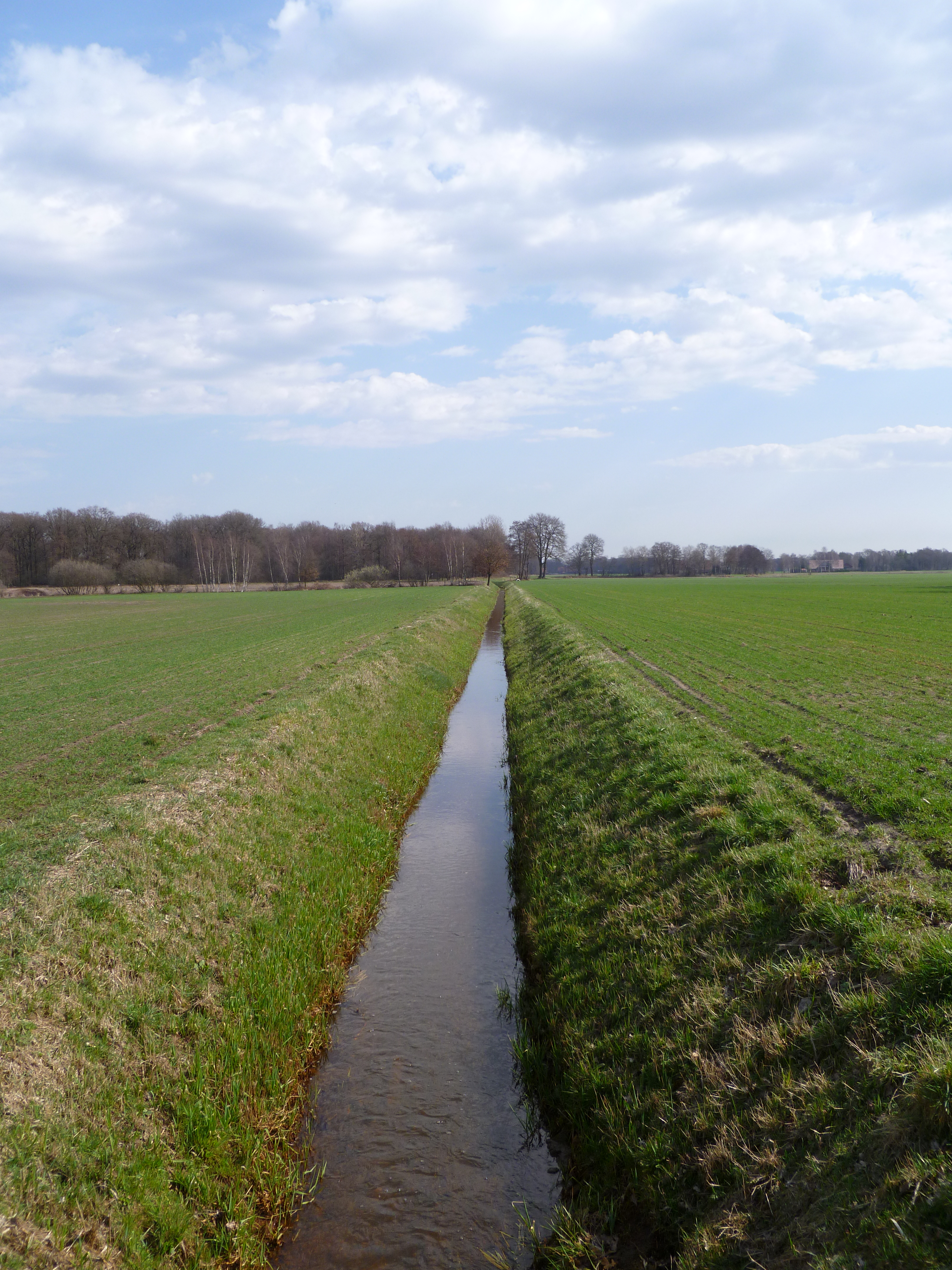 Meerbecke in Hopsten Ägypten. Blickrichtung Aa. Von der Brücke Bad/Ägypter Straße aus.